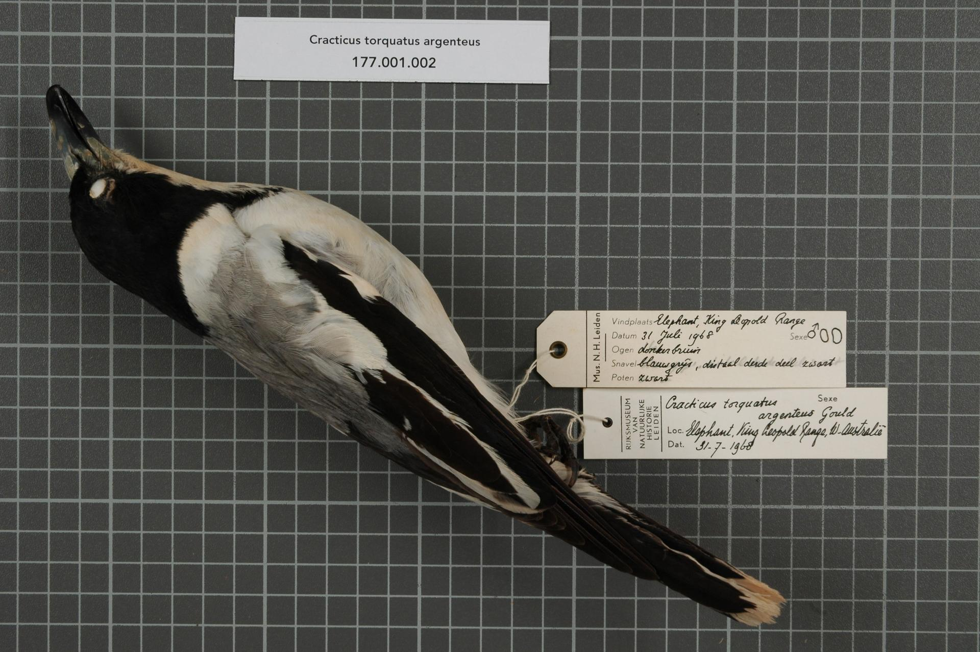 Cracticus torquatus argenteus Gould, 1841